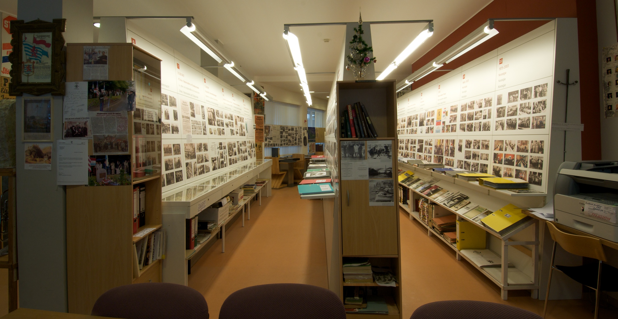 Zwangsrekrutéiertemusée zu Diddeleng